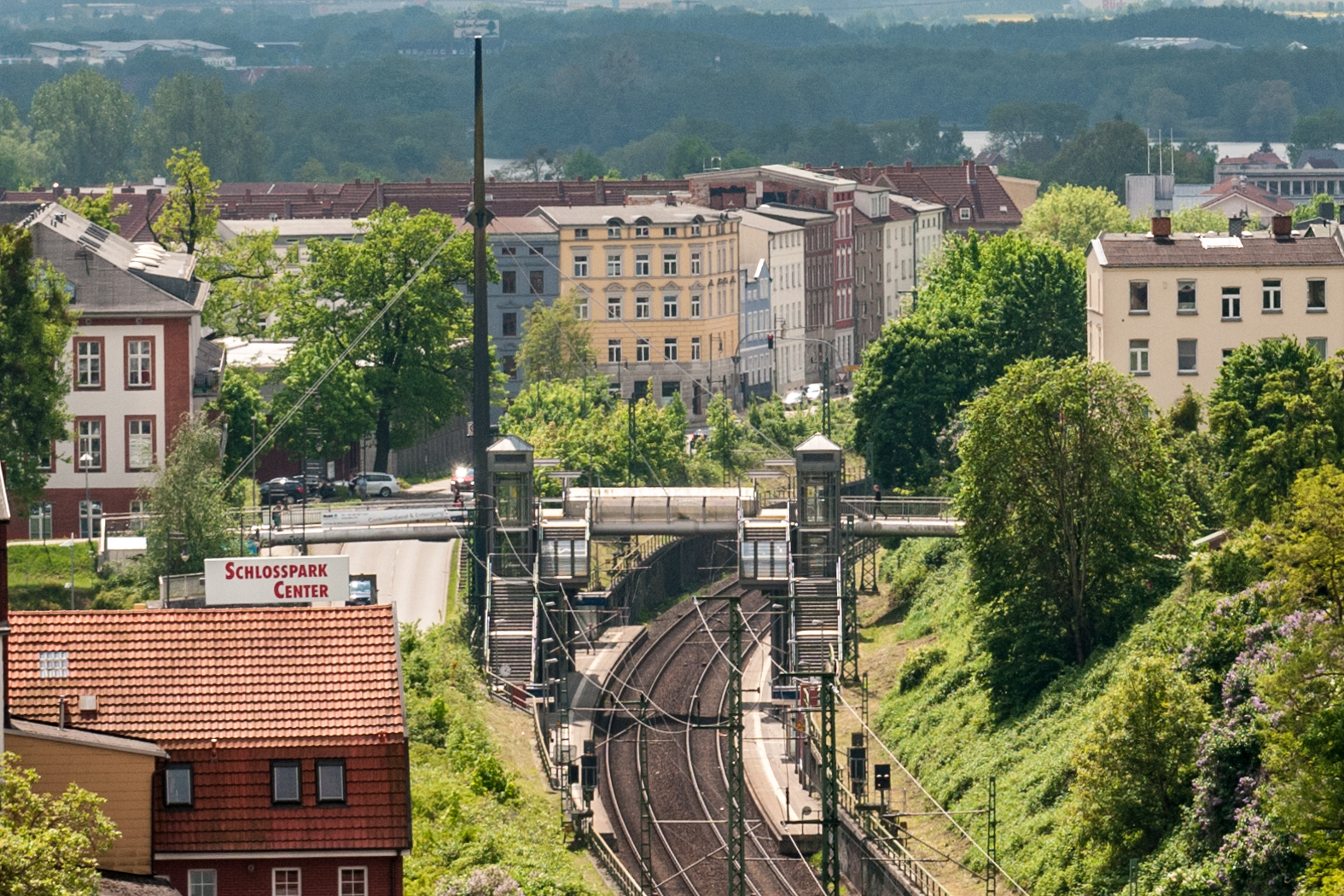 Bahnhof Schwerin-Mitte